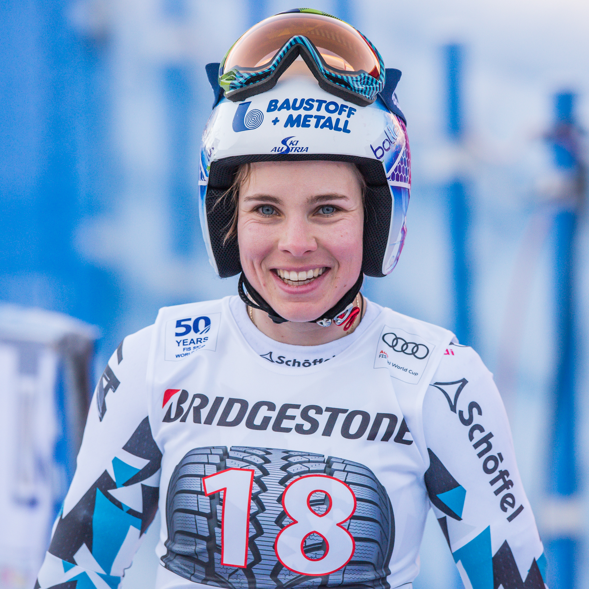 64. Kandahar Rennen,Audi FIS Ski Weltcup Garmisch-Partenkirchen,Damen Super-G,Kandahar,Ladies Super-G,Nicole Schmidhofer